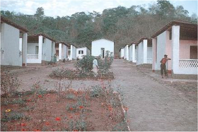 Vila San Marino